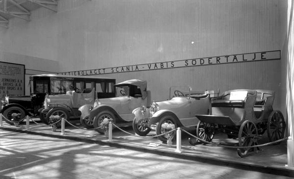 Jubileumsutställningen 1923. Firmautställning: Aktiebolaget Scania-Vabis, Södertälje.